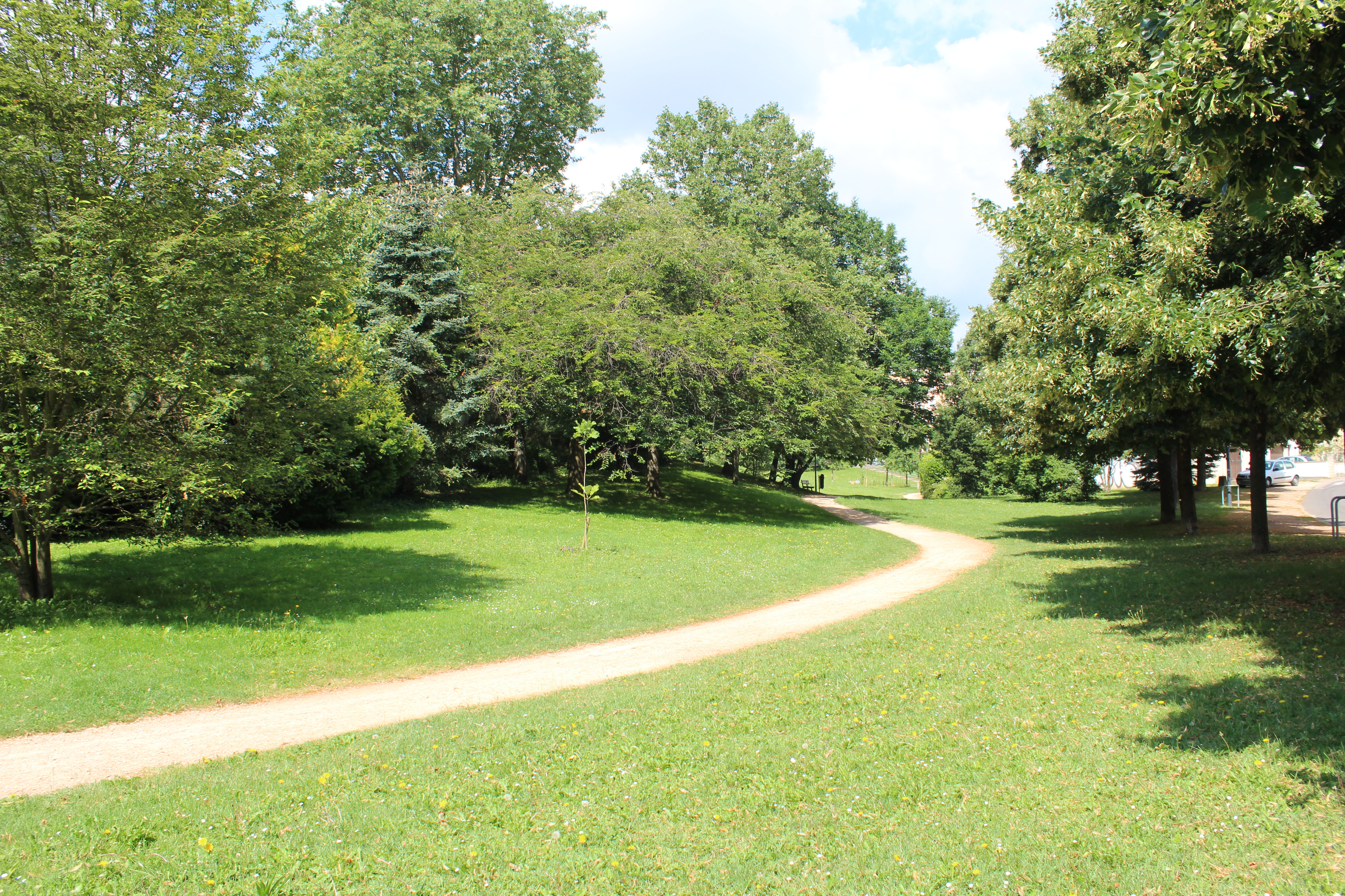 Le vallon des Rigolettes à Mâcon.